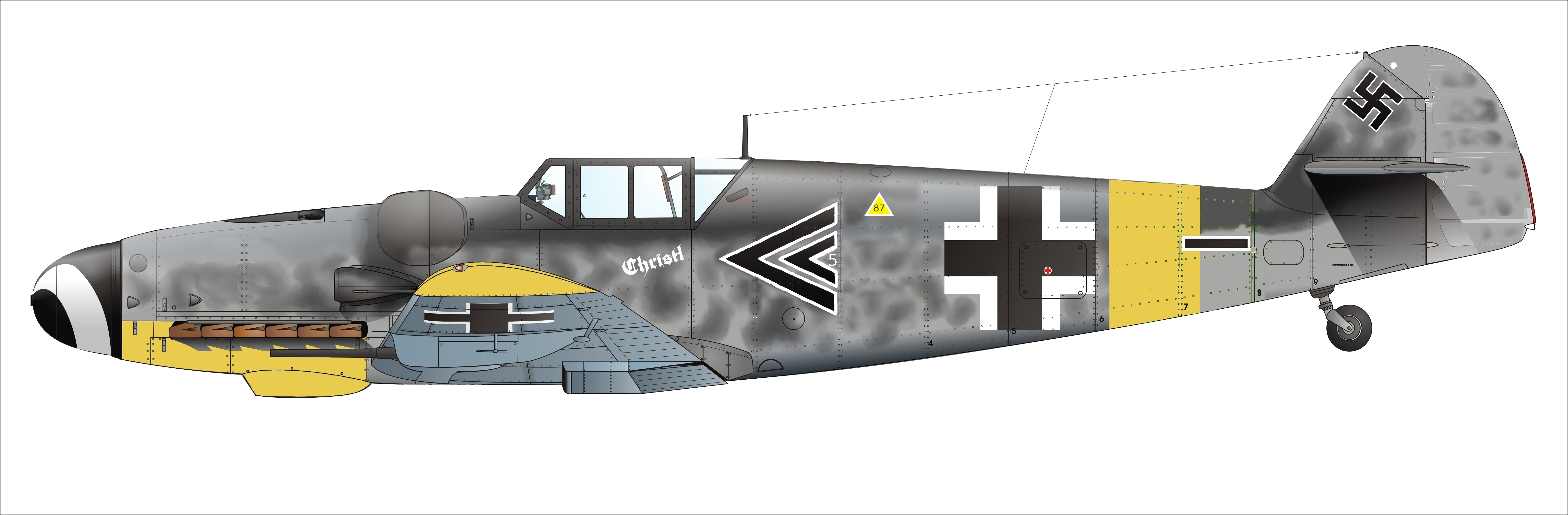 Bf 109 G-6, Stab II/JG52, Gerhard Barkhorn, November 1943